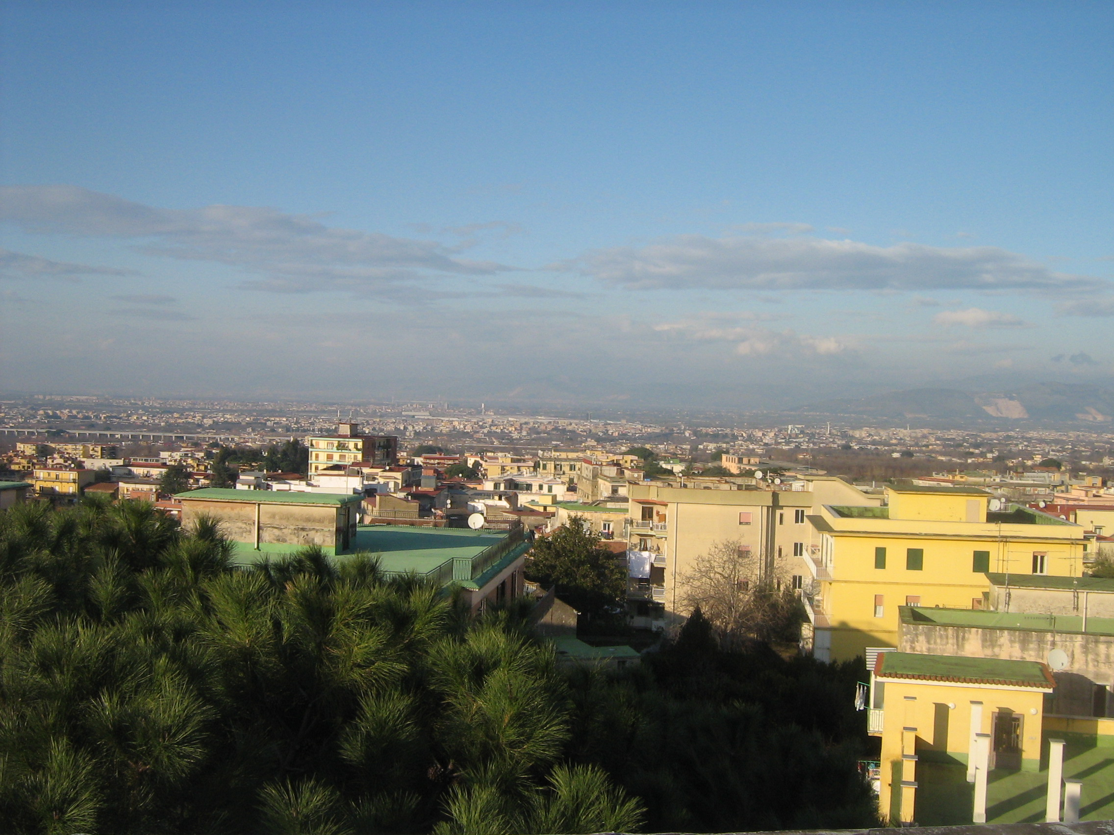 Autore: Lusb 11-01-2009